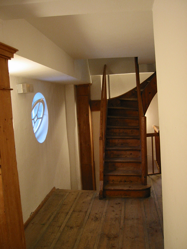 Stadttheater Weißenhorn, Germany: Staircase